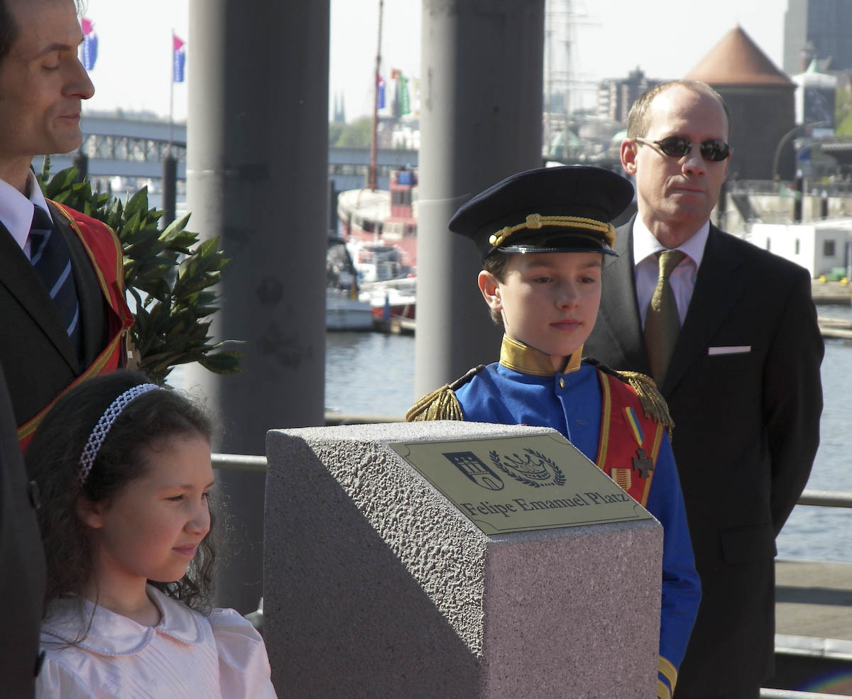 Filmset "Pfefferkörner". am Drehort einer Kinderserie in der realen Kulisse der Hamburger Speicherstadt